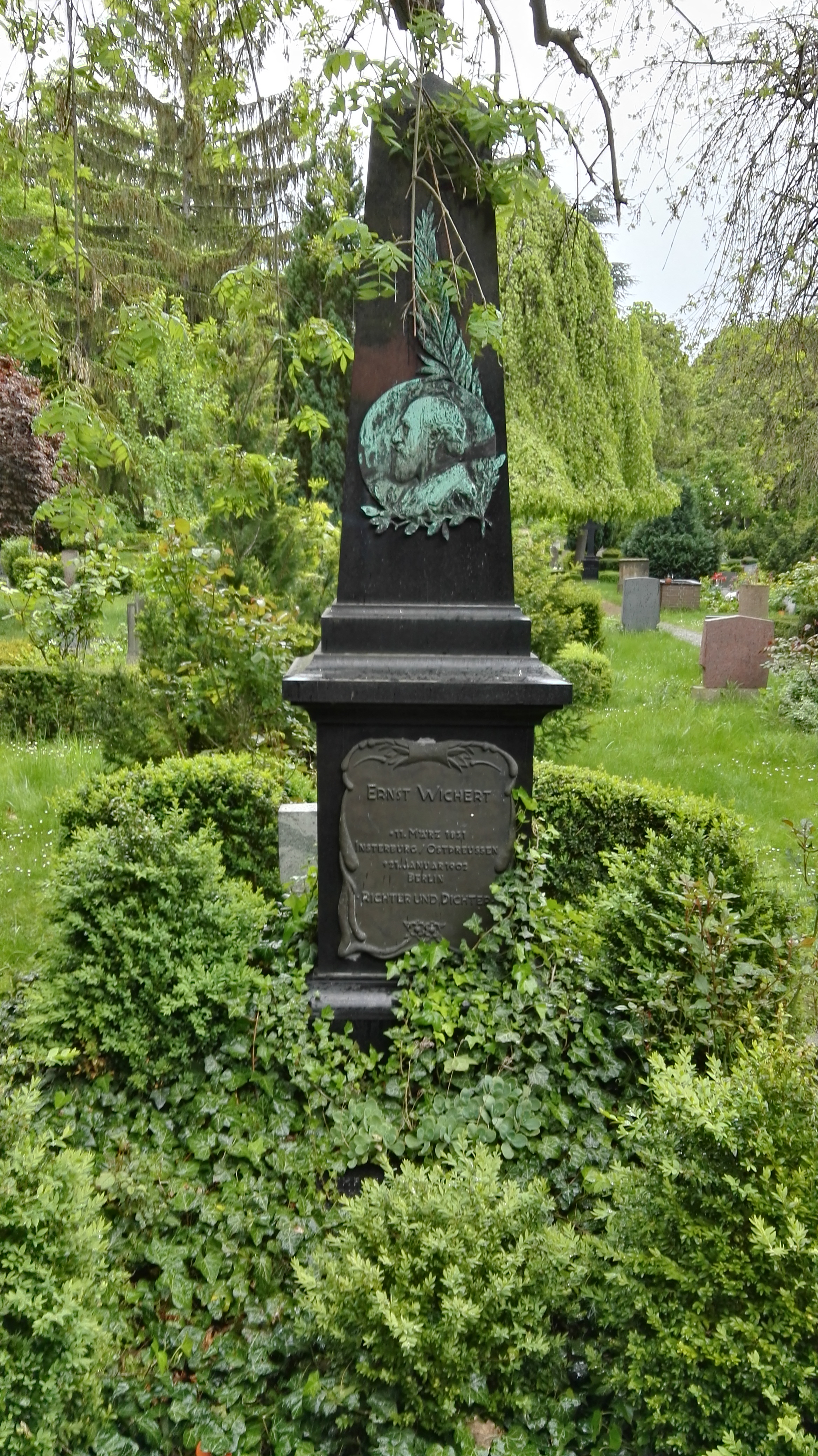 Grabstätte für Ernst Wichert auf dem Alter Friedhof der Zwölf-Apostel-Gemeinde in Berlin-Schönberg